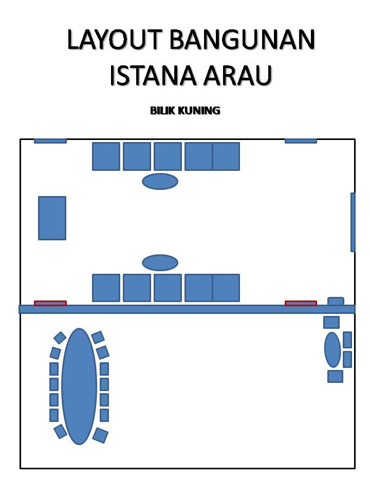 BILIK KUNING